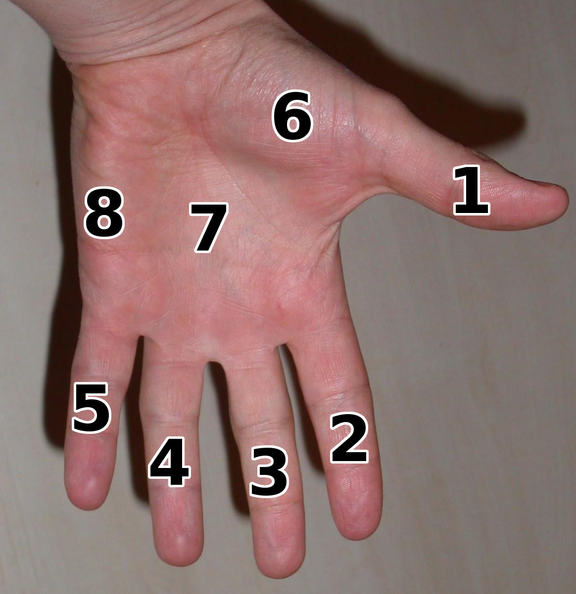 Main gauche humaine vue de face et numérotée.